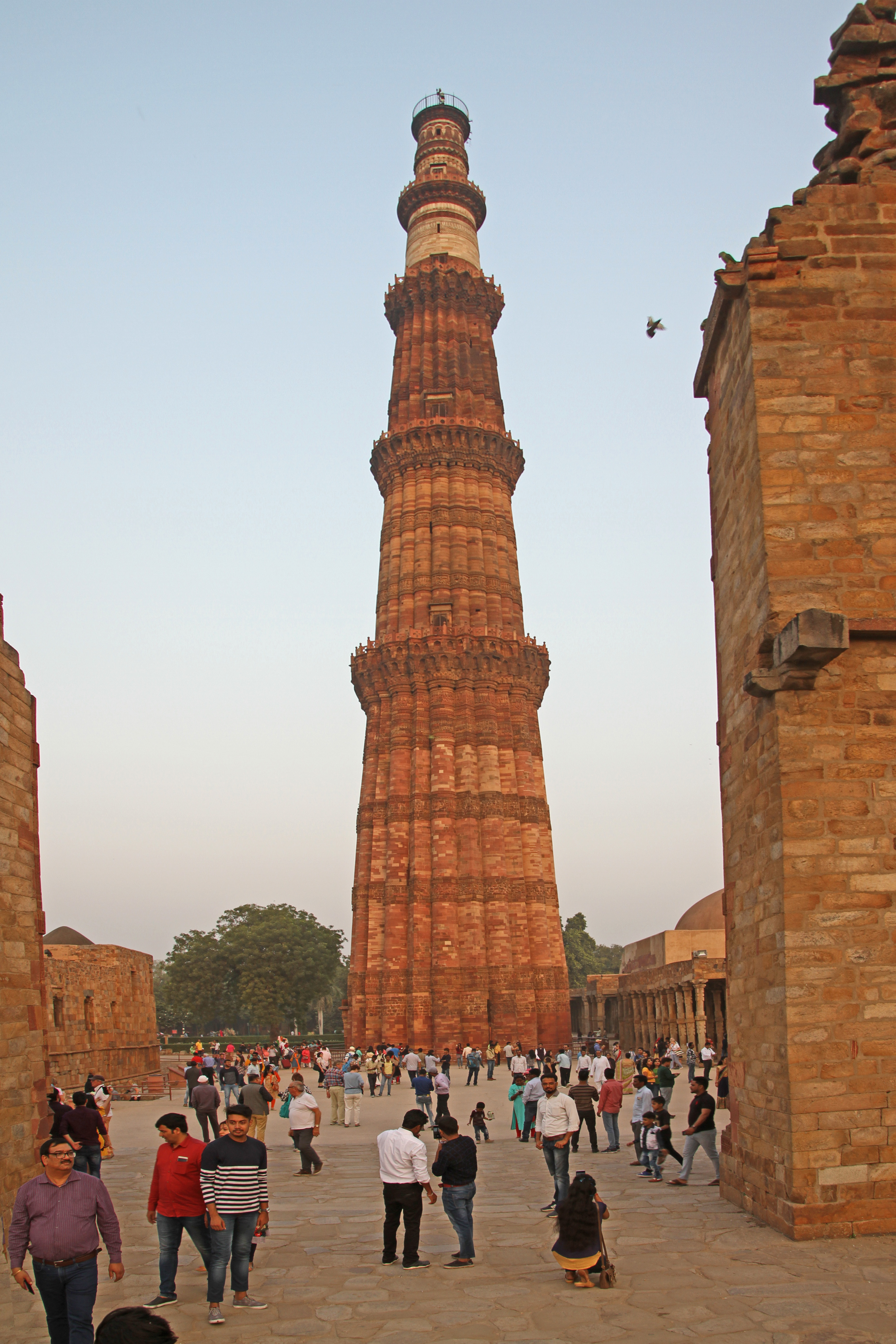 Qutb Minar